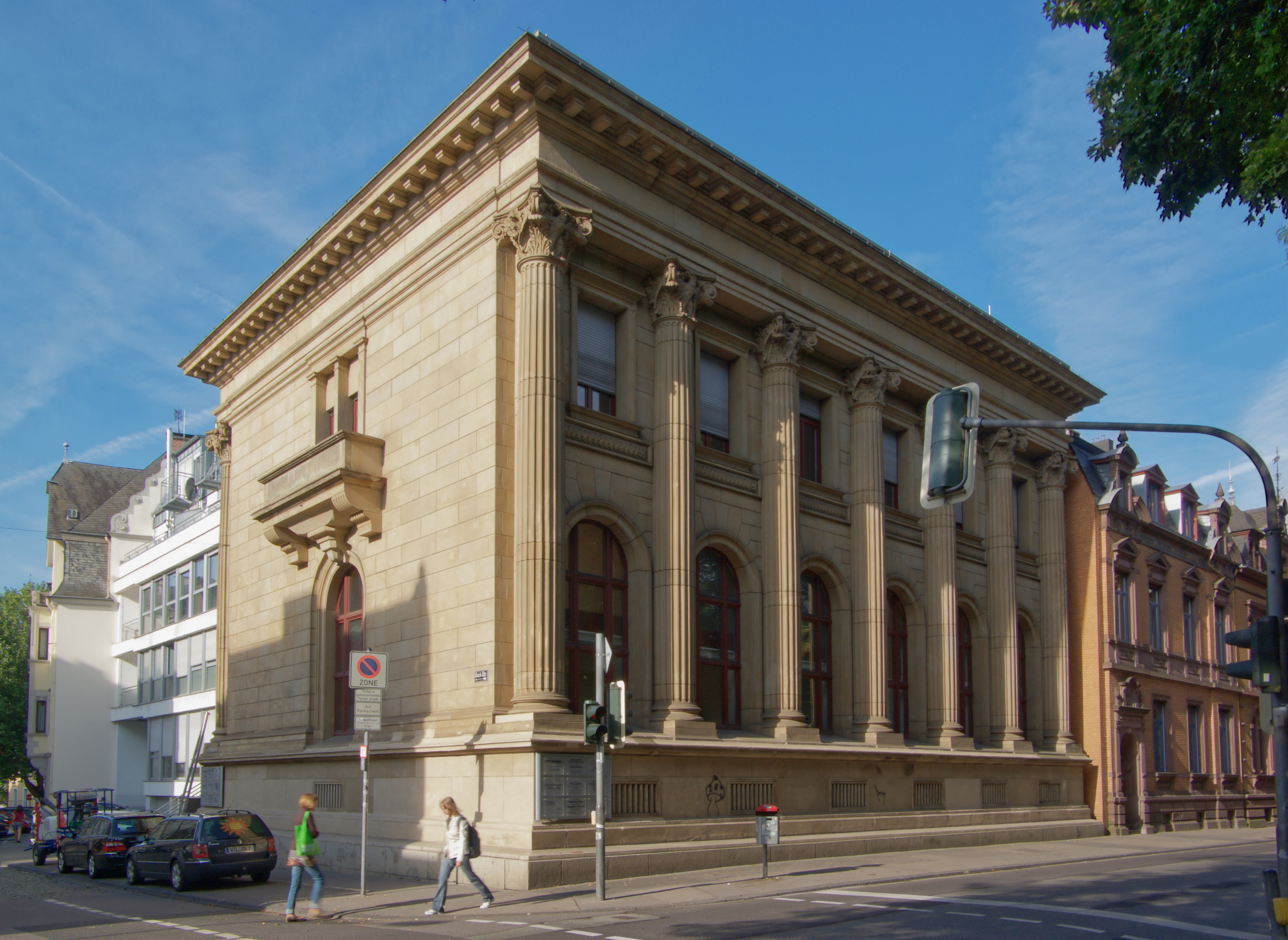 Trier, Kochstraße 13: ehemalige Filiale der Kaiserlichen Reichsbank; neuklassizistische Umfassungsmauern, monumentale, römischer Kolossalordnung nachempfundene Hauptfassade, 1903, Architekt Emmerich